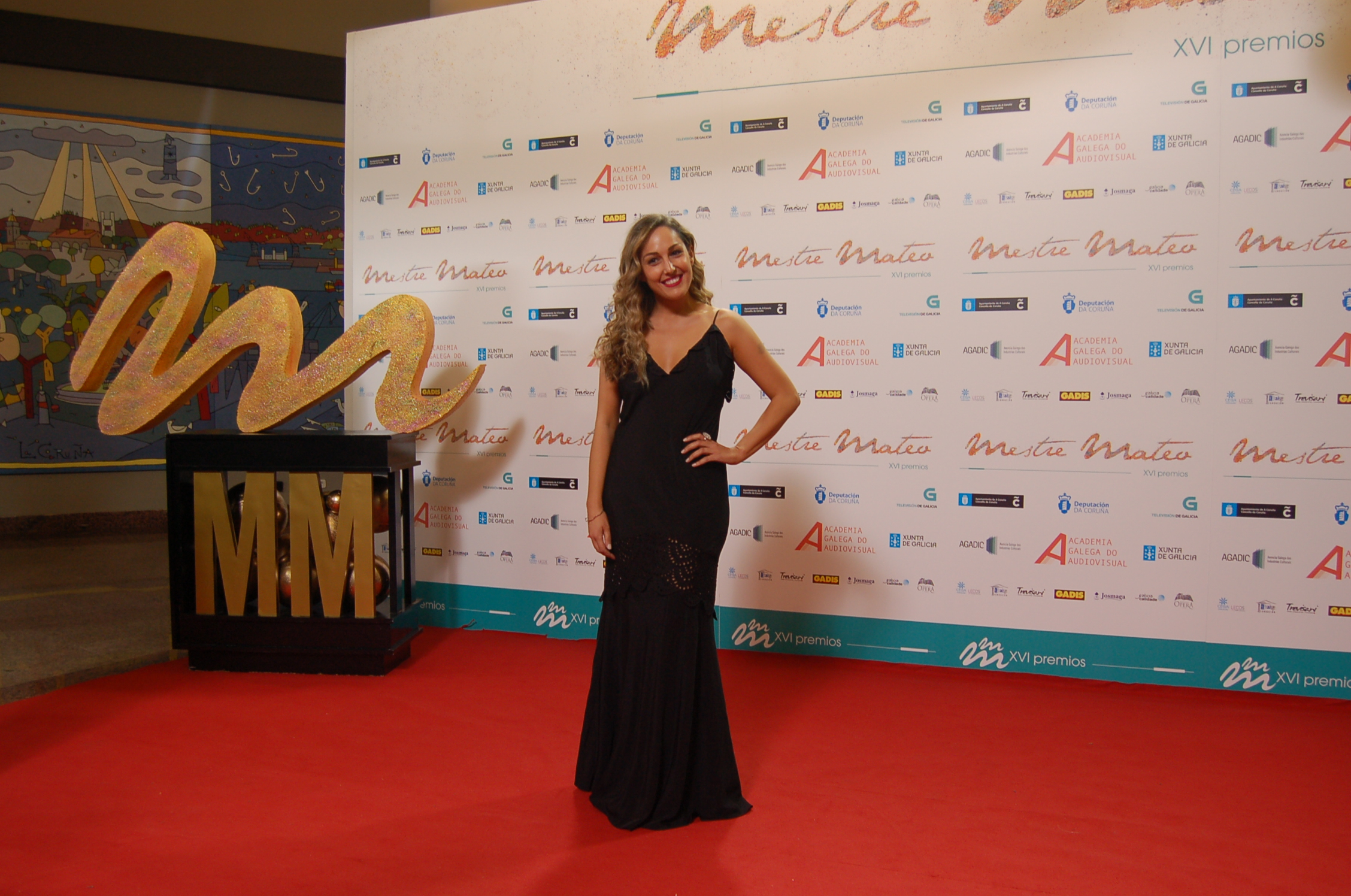 Premio Mestre Mateo 2017 phtocall